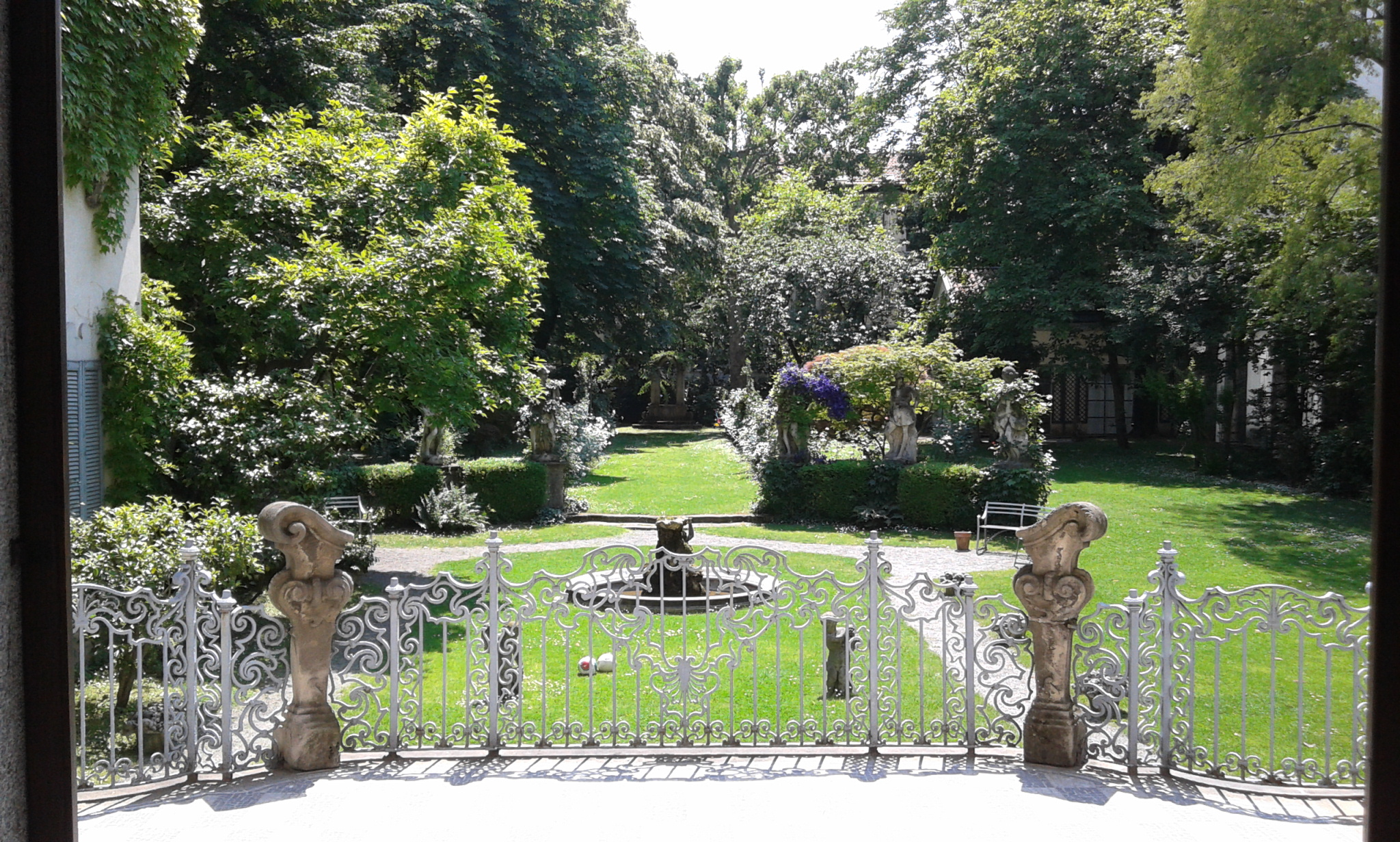 Casa degli Atellani (Milan), giardino